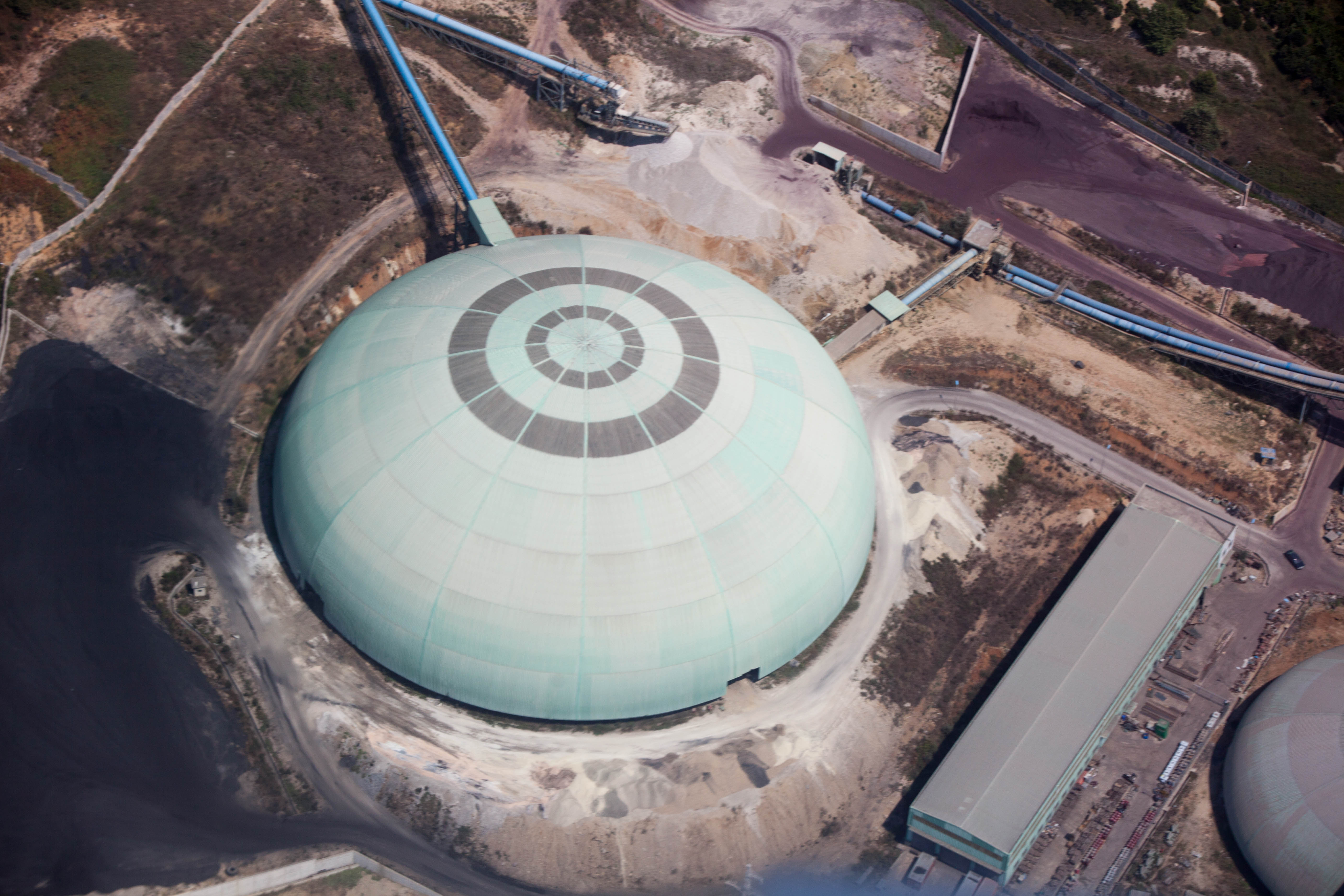 Cement factory in Fushë-Kruja, Albania